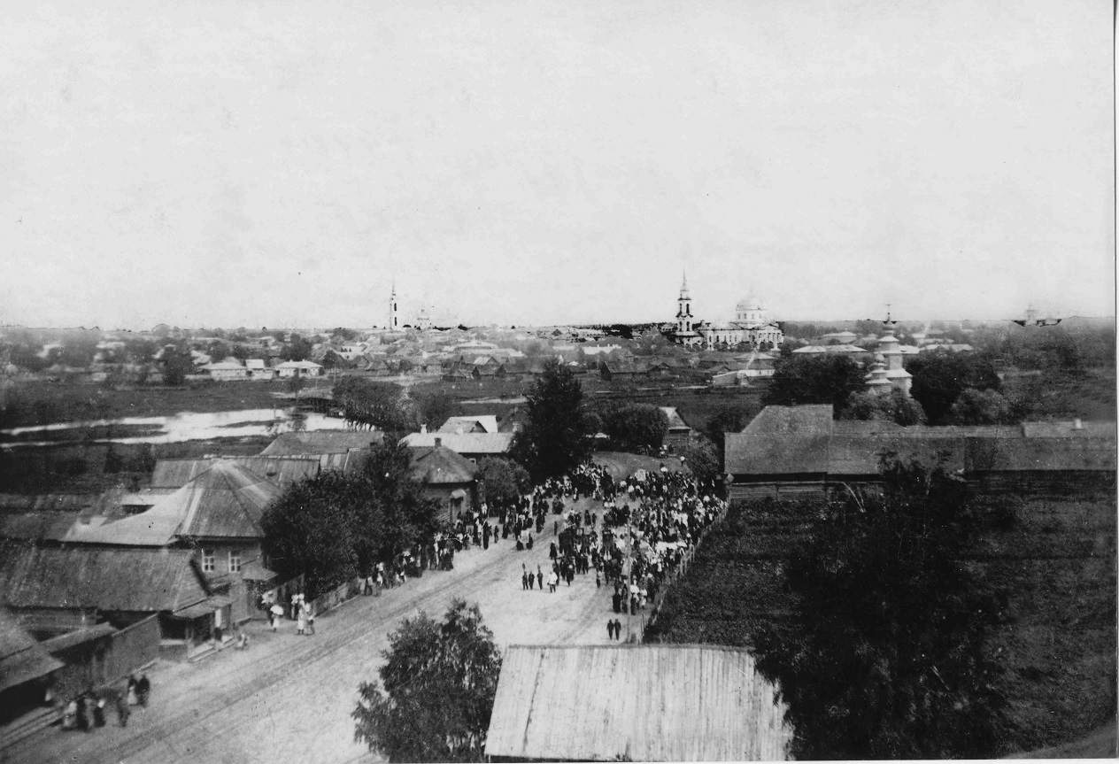 Жиздра. Вид на старый город